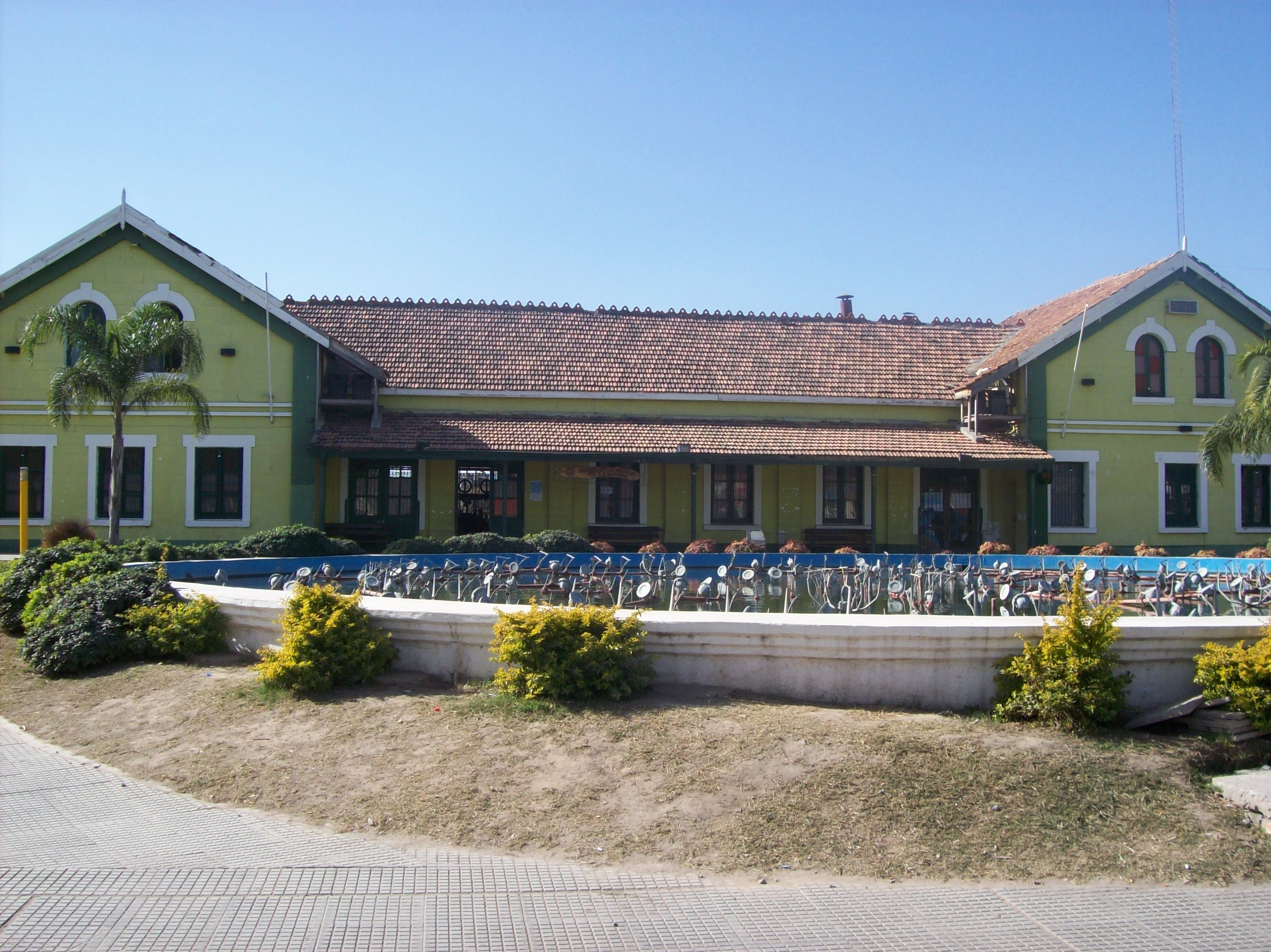 Frente de la estación La Banda en la provincia de Santiago del Estero, Argentina.